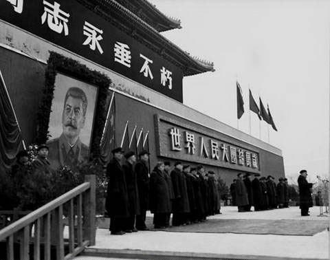 中文（台灣）: 天安門史達林肖像